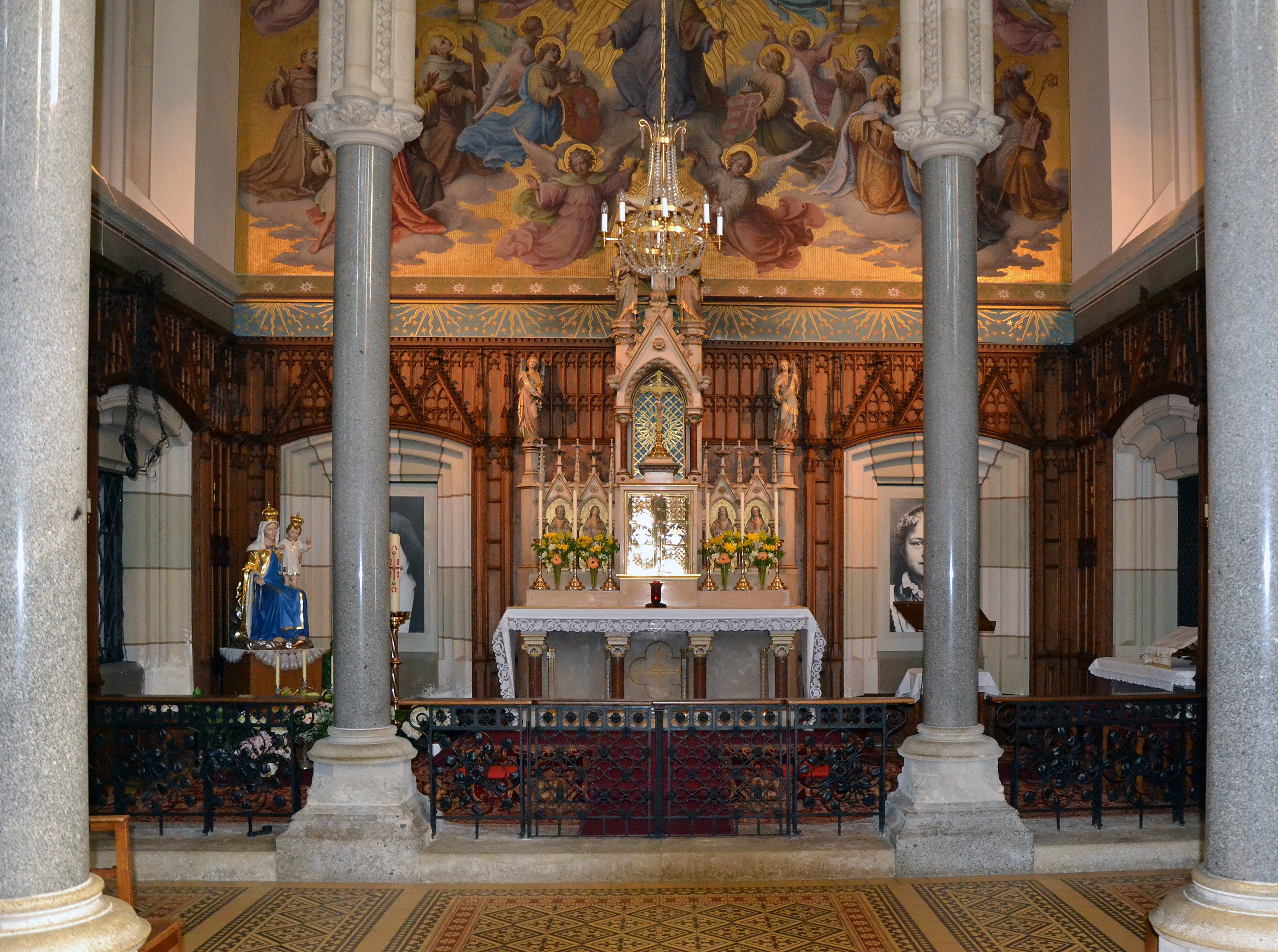 Mayerling - ehemaliges Schlafzimmer (Ort der Tragödie)